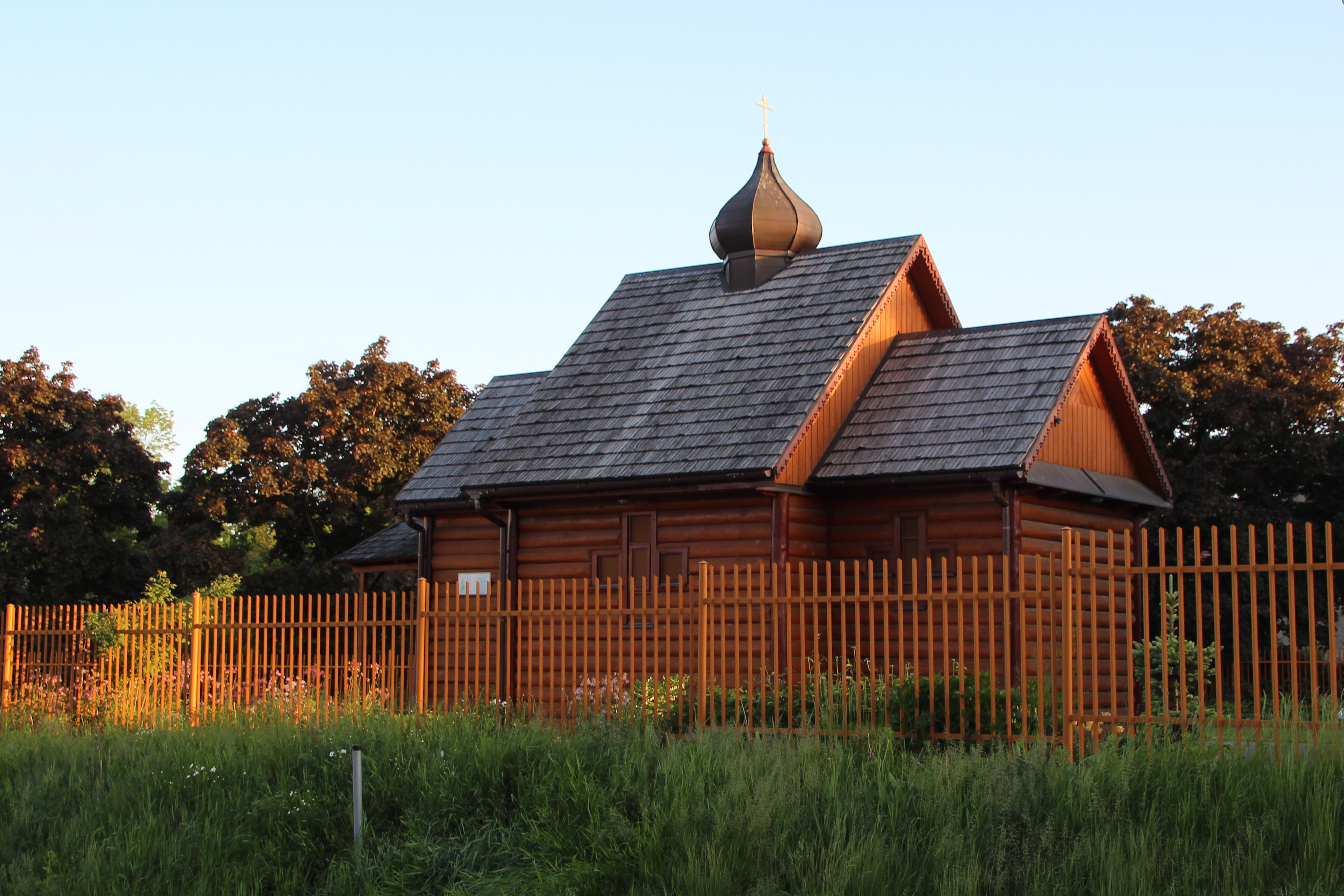 Zgorzelec – miasto w Polsce, w województwie dolnośląskim, w powiecie zgorzeleckim.